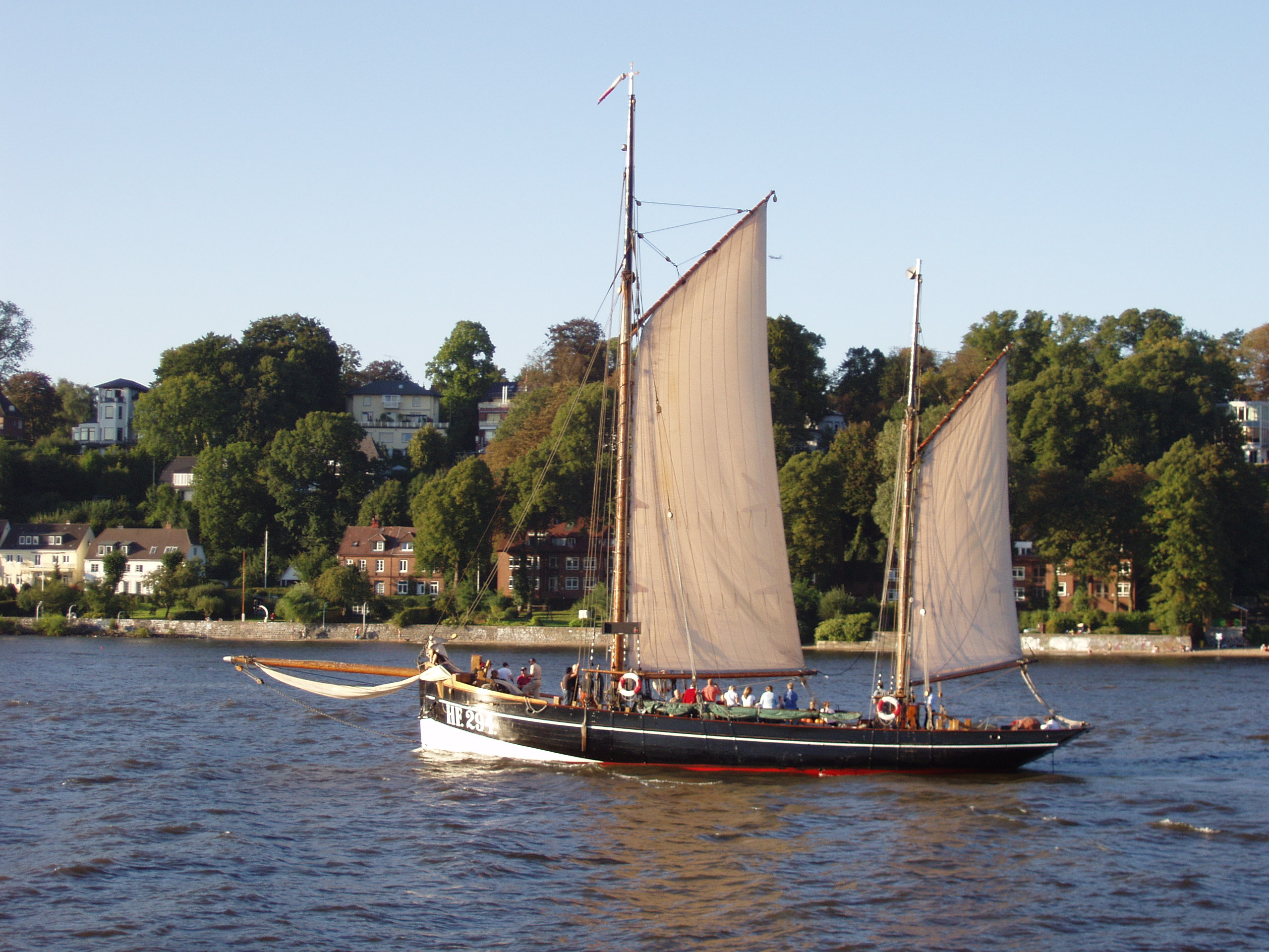 Der Segelkutter Praesident Freiherr von Maltzahn in Hamburg auf der Elbe.